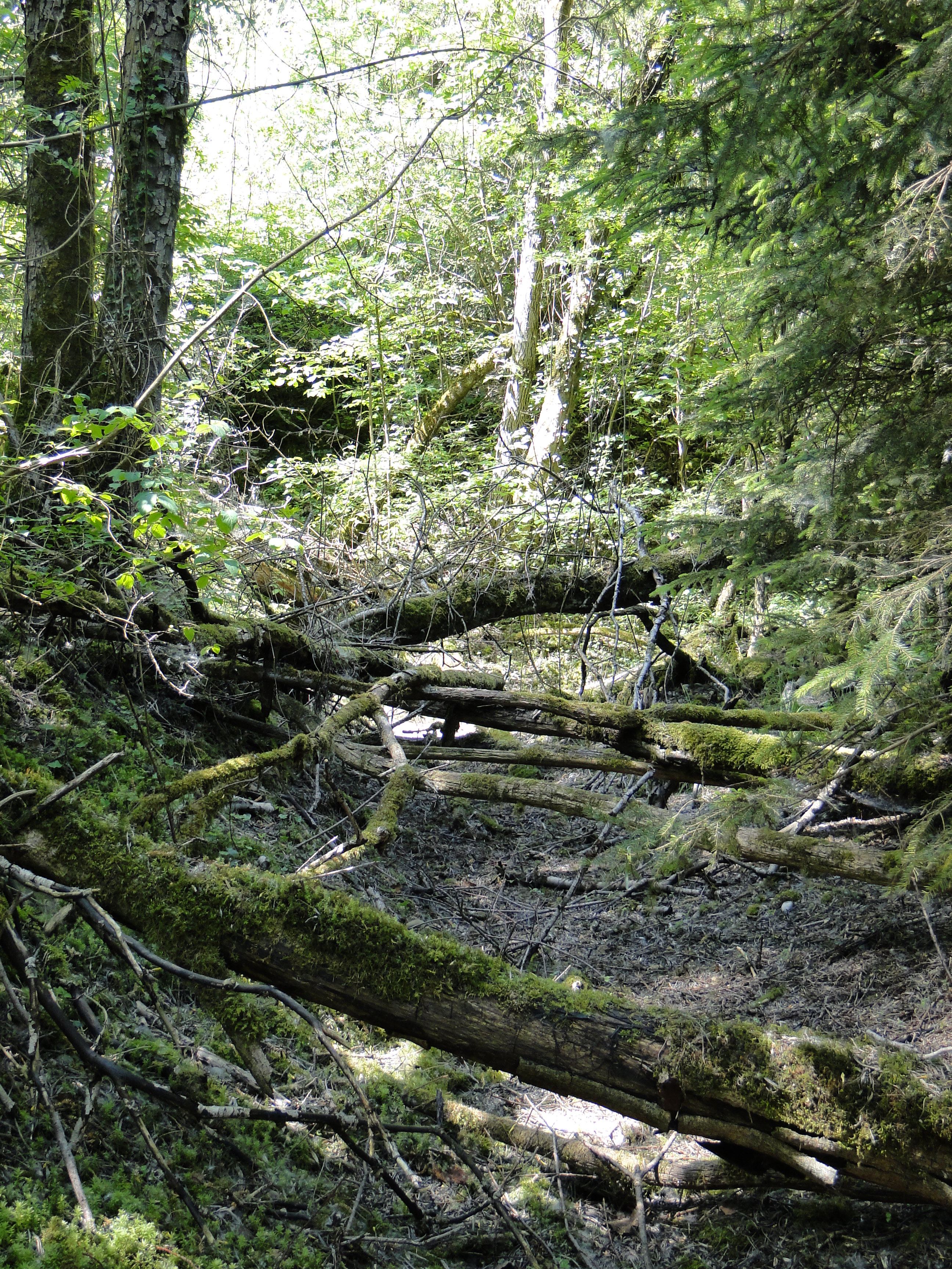 Biotopholz, Naturschutzgebiet Kiesgrube Aitrach